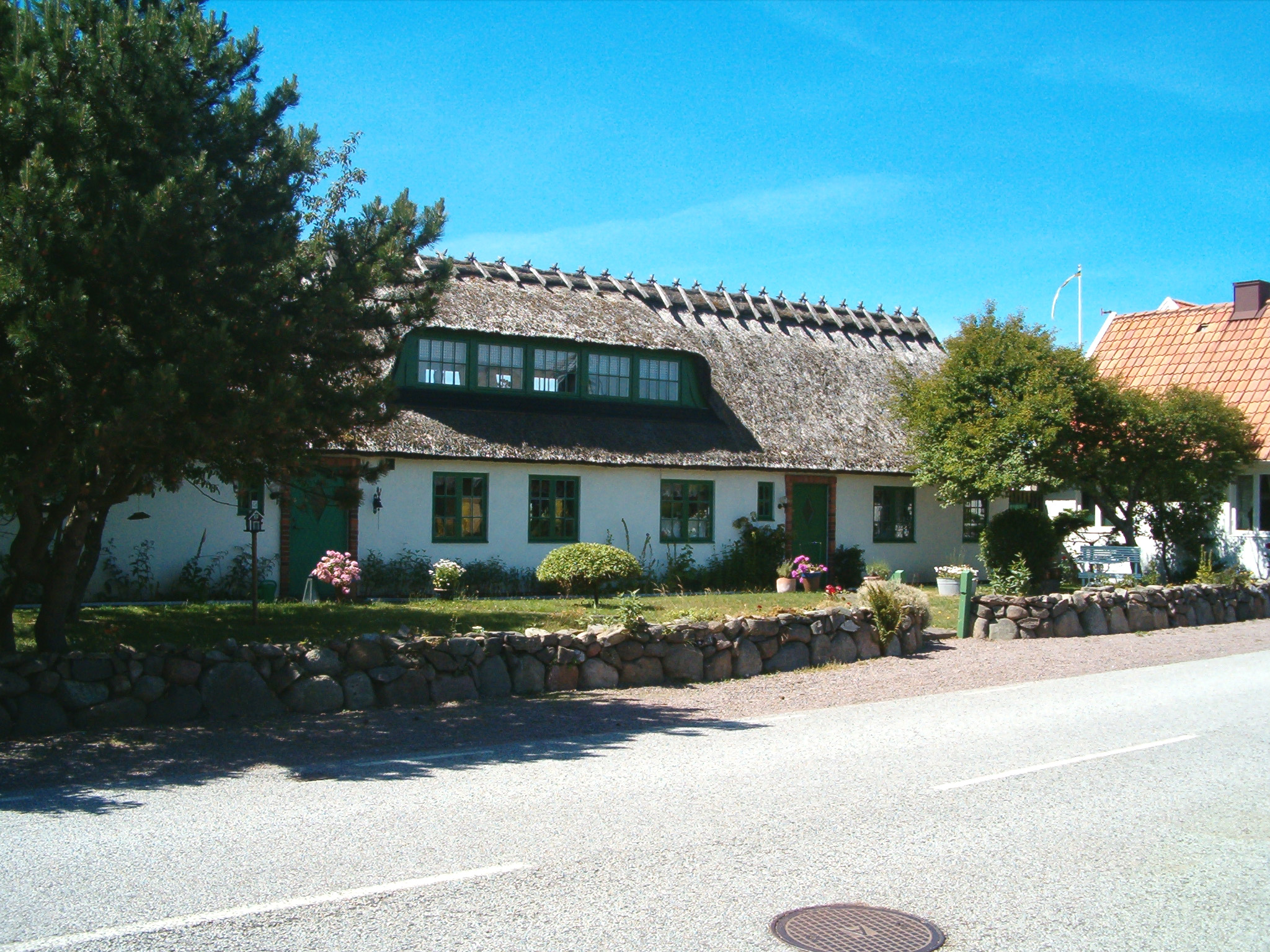 Hus i Domsten, Helsingborgs kommun.